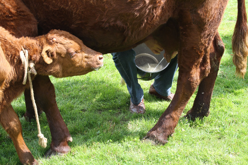 Traite manuelle d'une vache salers en présence de son veau